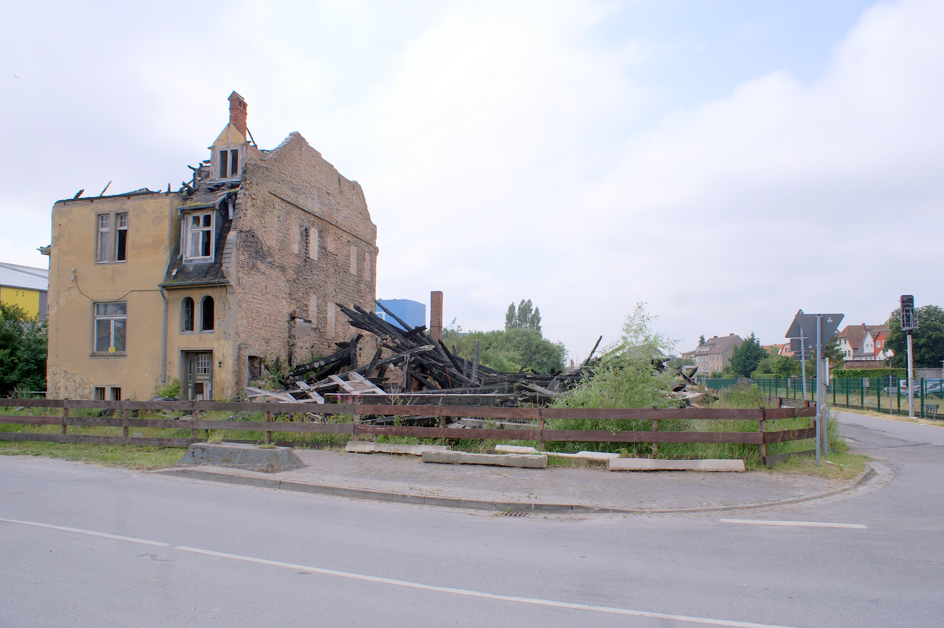 Wolgast, Reste des Kornspeichers am Hafen nach dem Brand